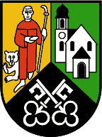 Sankt Gallenkirch, Vorarlberg: Ein in Göppelschnitt geteilter Schild, vorne in Gold eine rot bekleidete Mönchsgestalt (hl. Gallus) mit einem silbernen Wanderstab in der linken und einem silbernen Brot in der rechten Hand, vor einem kleinen silbernen Bären, hinten in Grün eine silberne schwarzbedeckte Kirche und unten in Schwarz zwei gekreuzte silberne Schlüssel. (Verleihung: 19. April 1966)